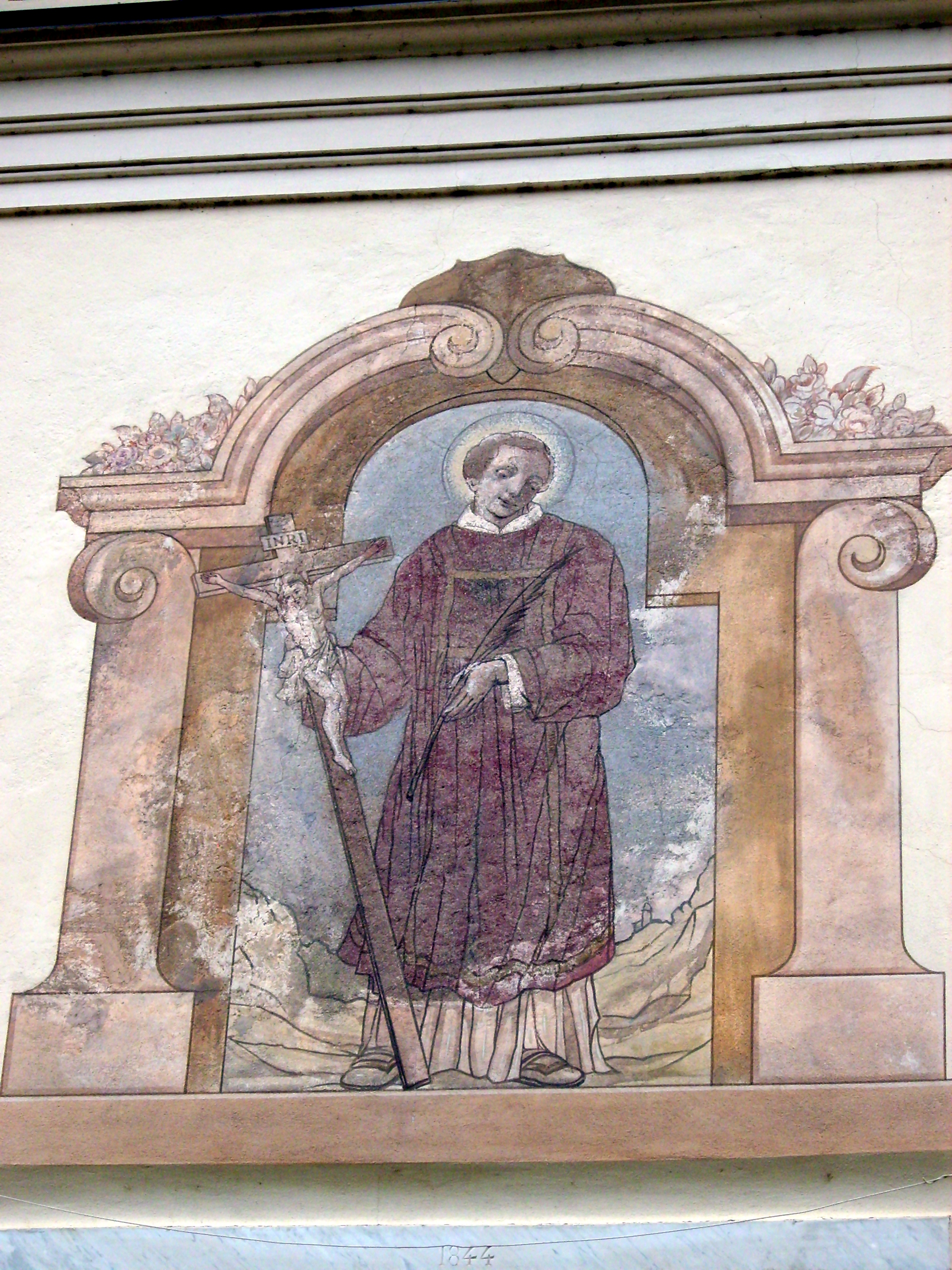 Affresco della facciata del santuario Nostra Signora del Rosario presso Favale di Malvaro, Liguria, Italia